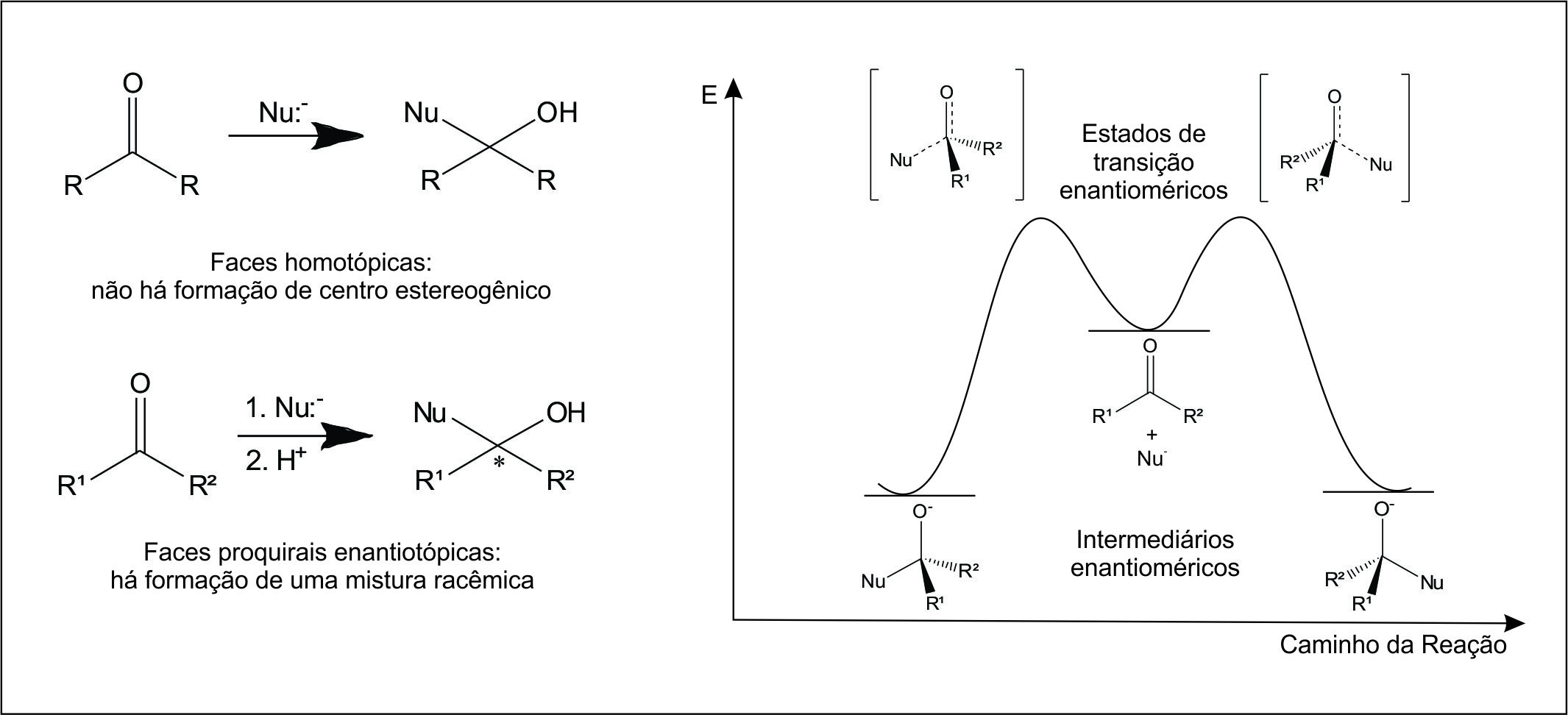 Esquema adaptado de COSTA et al, 2003, p.65.